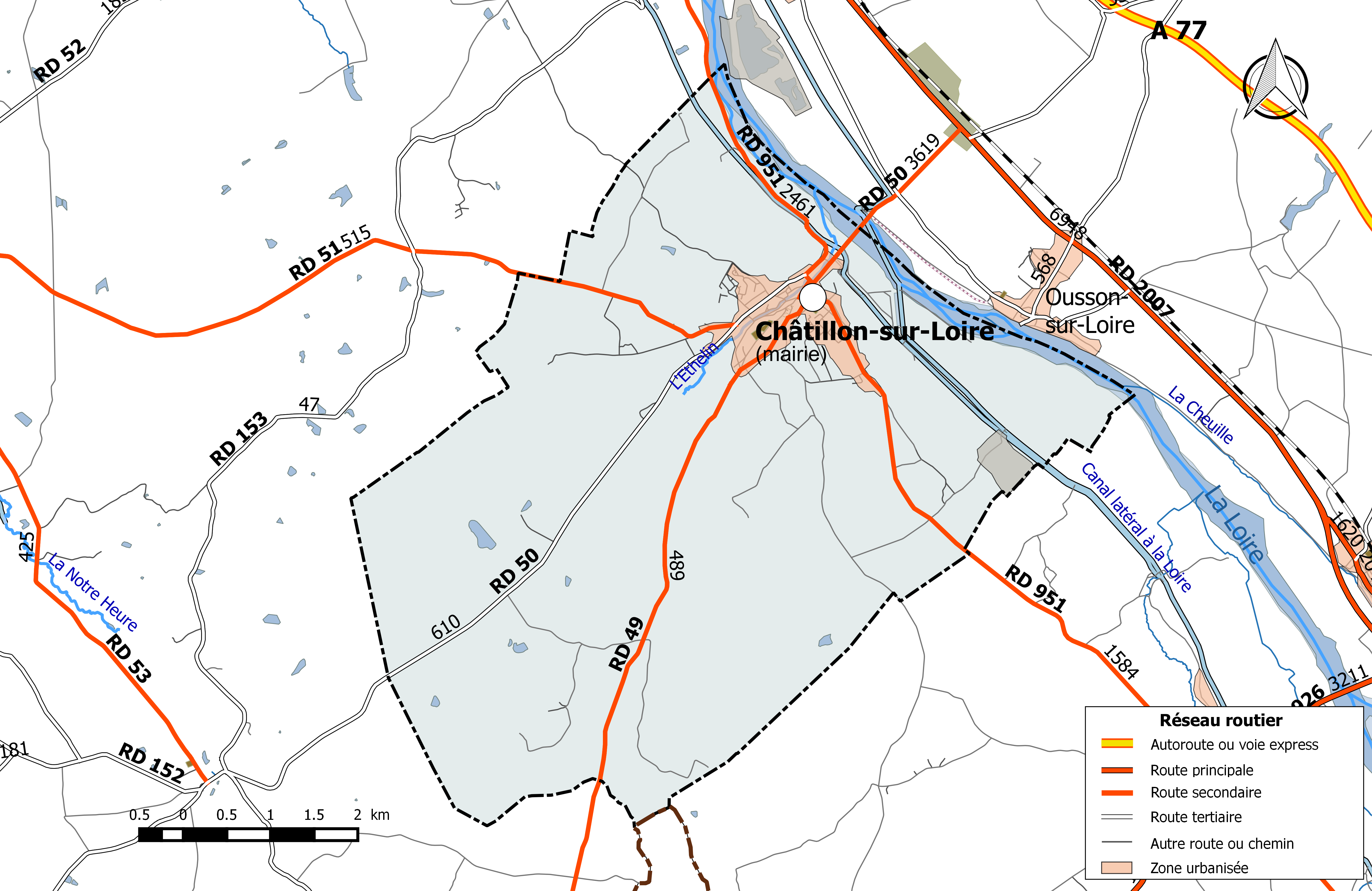 Carte du réseau routier de la commune de Châtillon-sur-Loire.